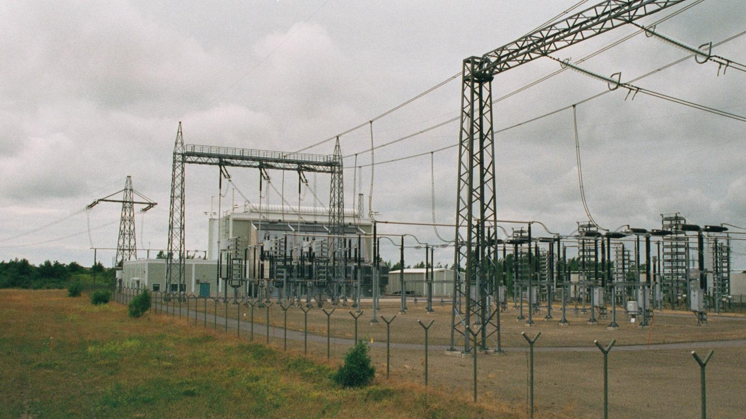 Stromrichterstation Kruseberg (Umspannanlage Arrie) in Schweden (Zustand Juli 2002)